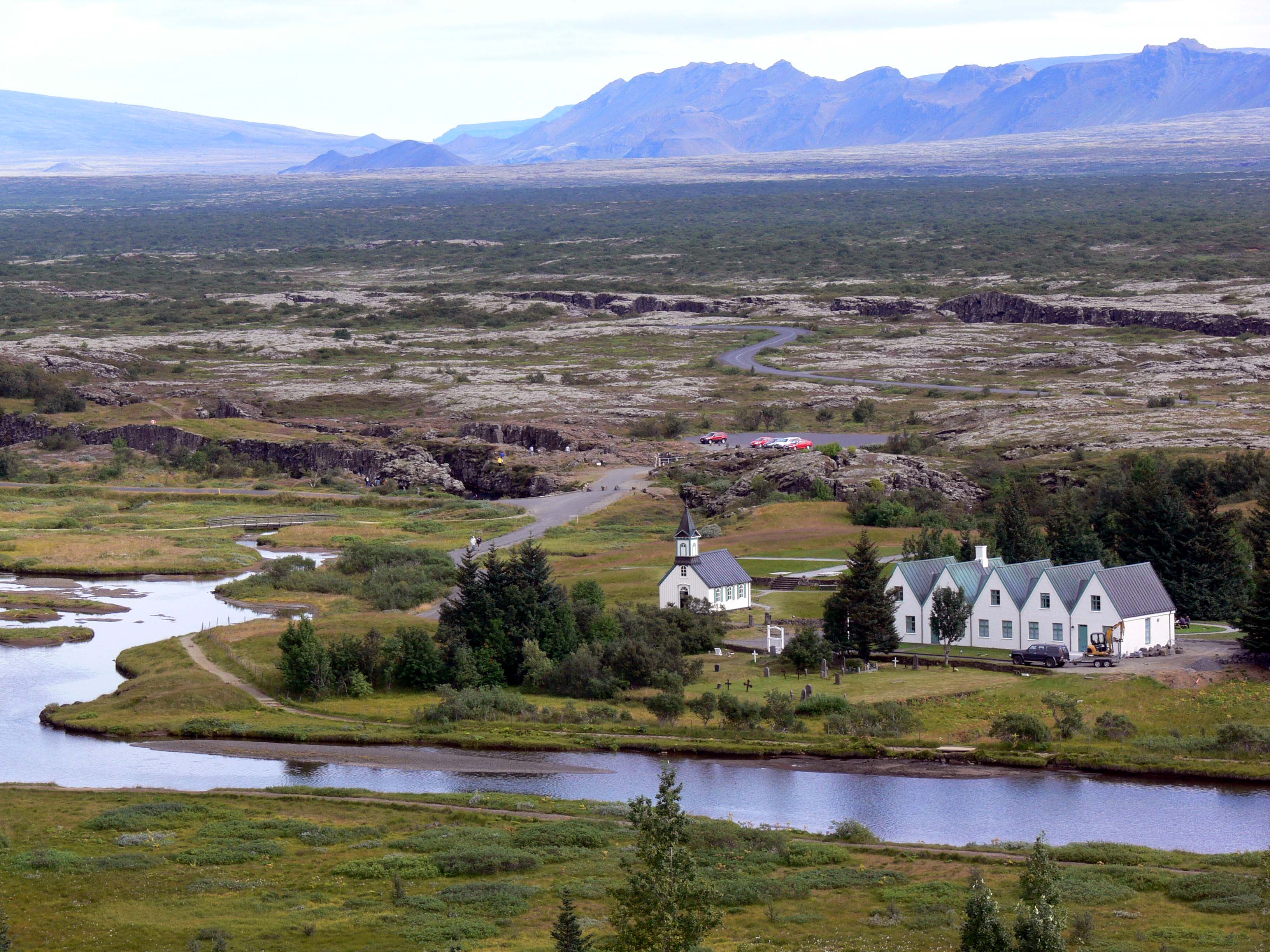 Þingvallavatn